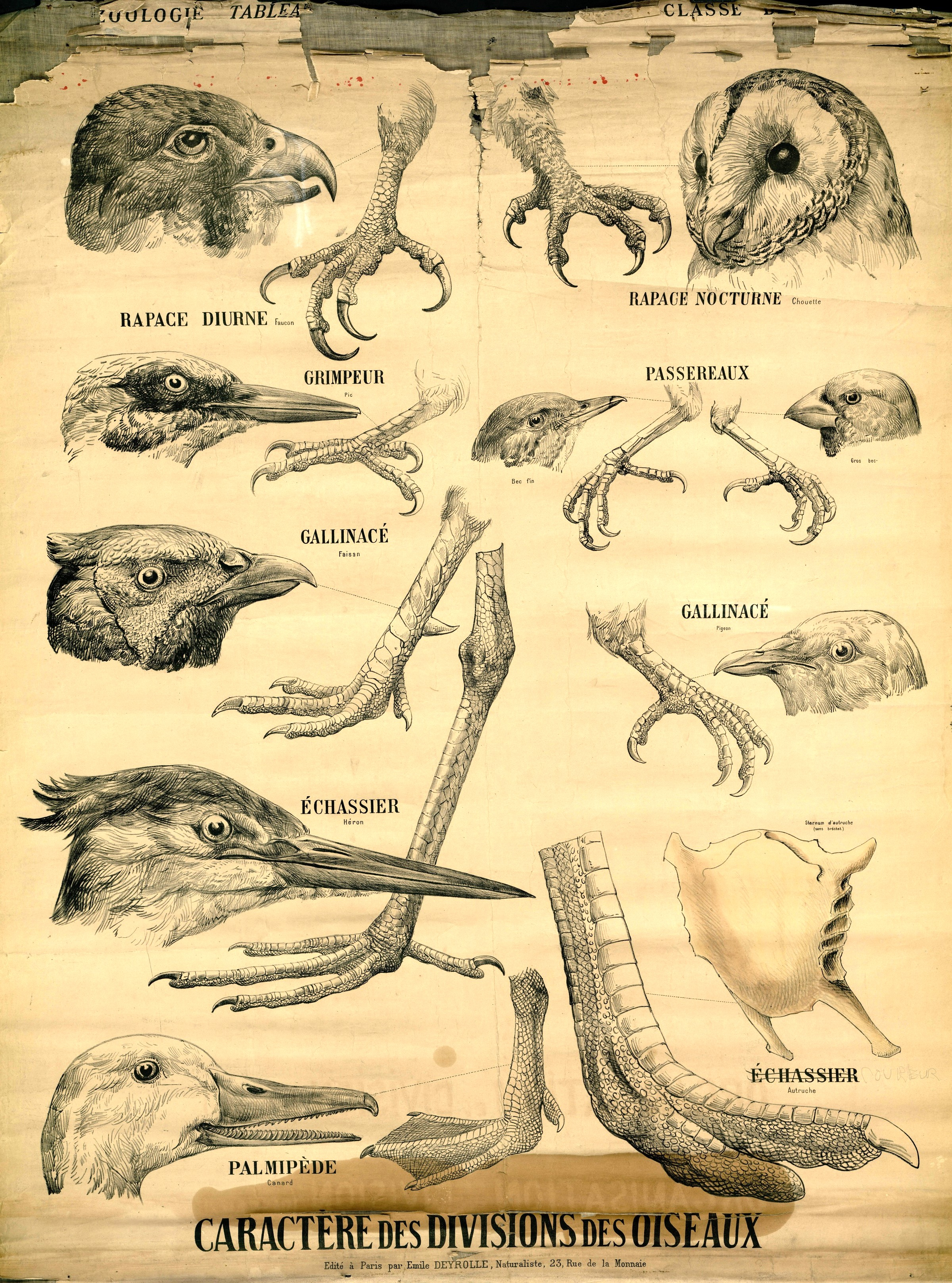 Caractère des divisions des oiseaux. Bibliothèque Numérique de l'Université d'Artois. Retrieved on 26 March 2016.